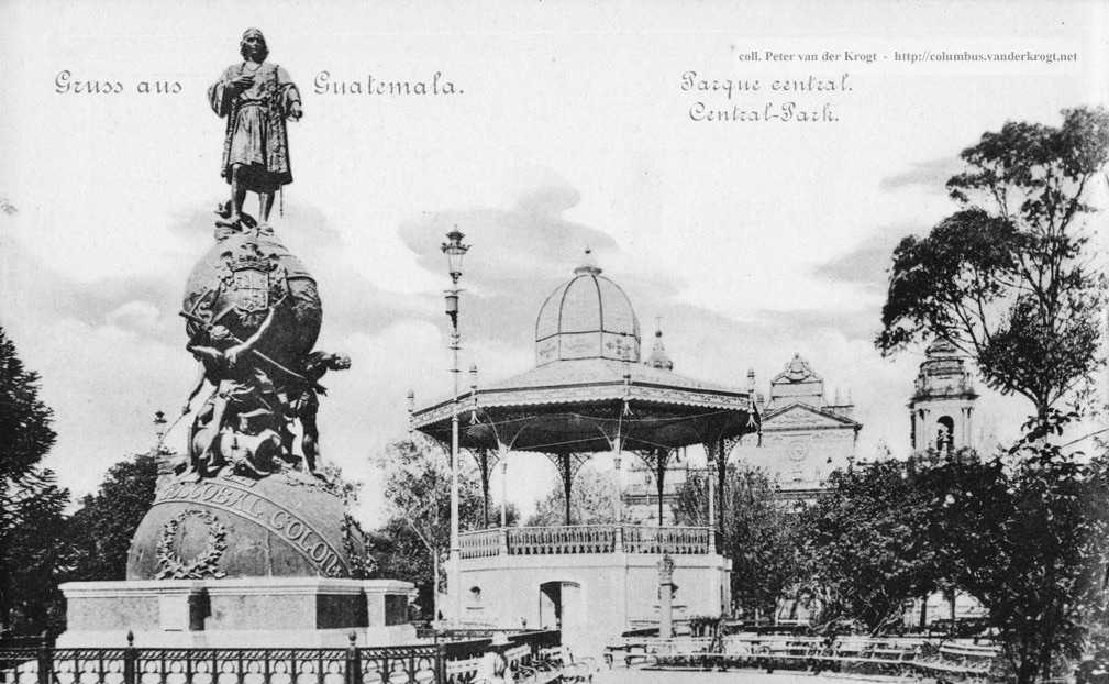 Plaza de armas tras su remodelación en 1896.